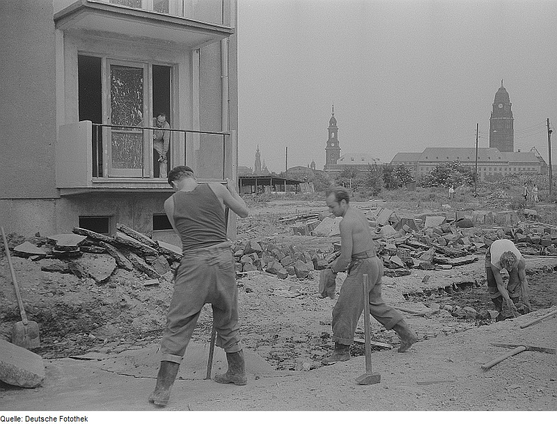 Original image description from the Deutsche Fotothek Dresden. Wohnungsbau, im Hintergrund Kreuzkirche undRathaus